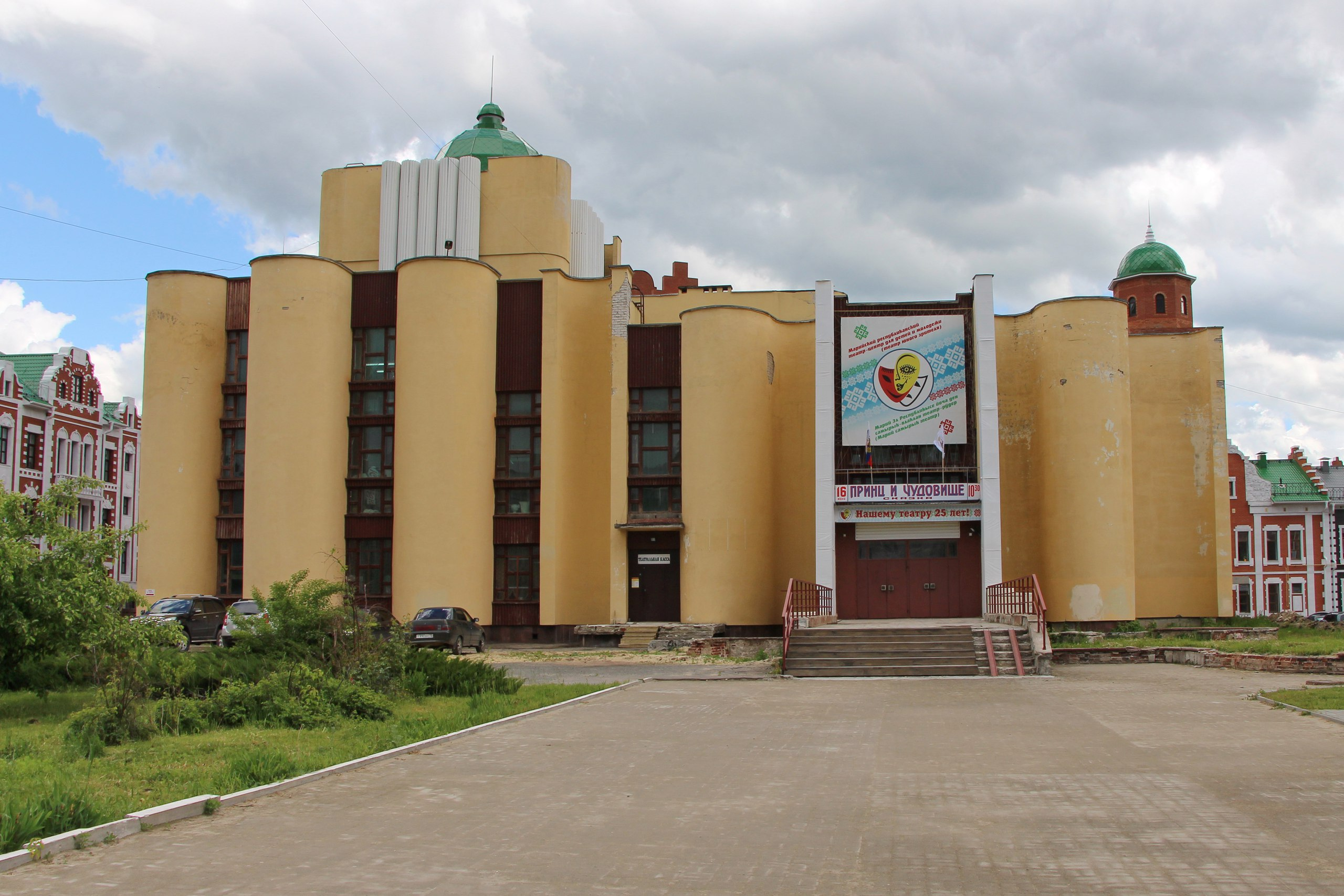 Республиканский театр юного зрителя, город Йошкар-Ола